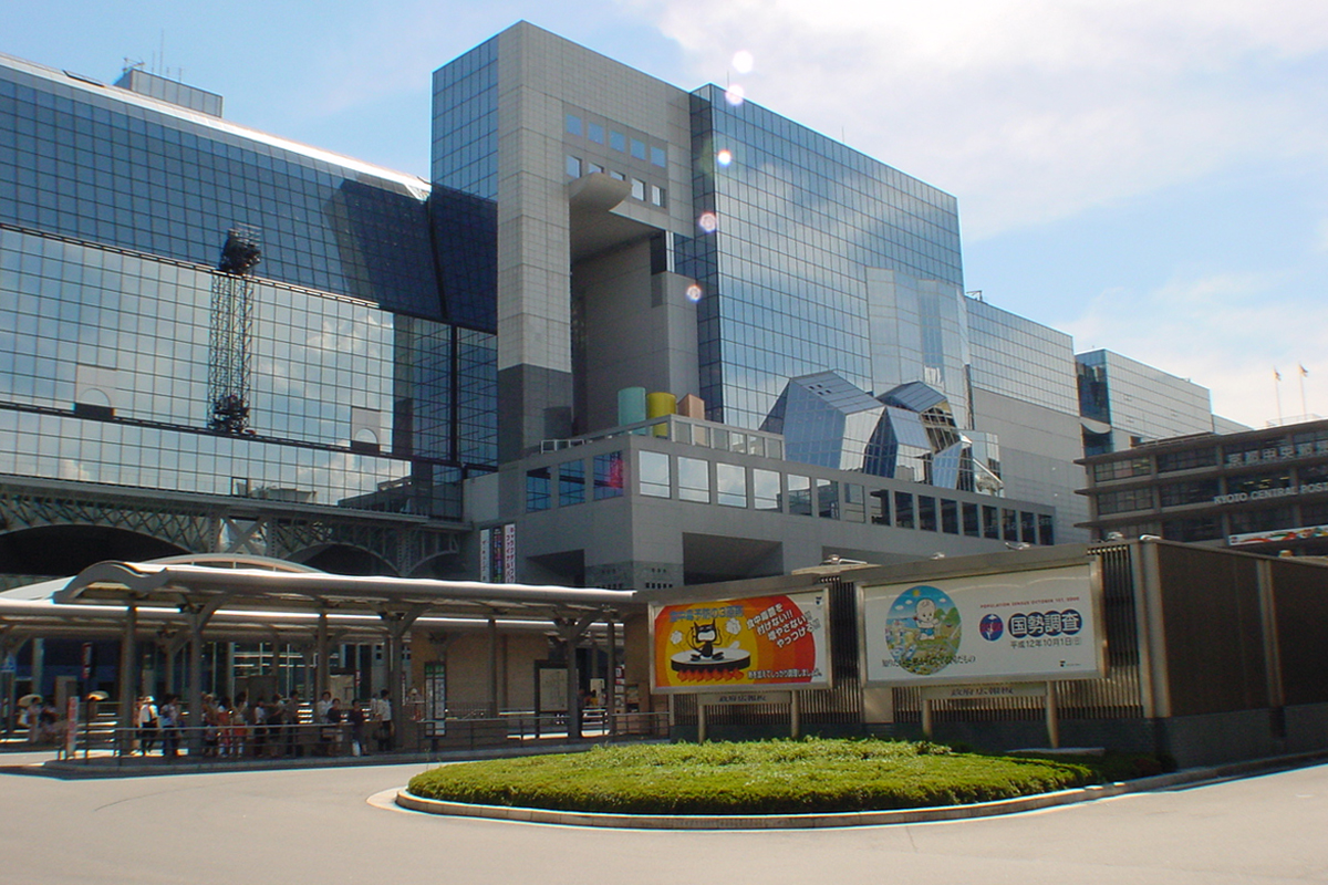 [MAP]